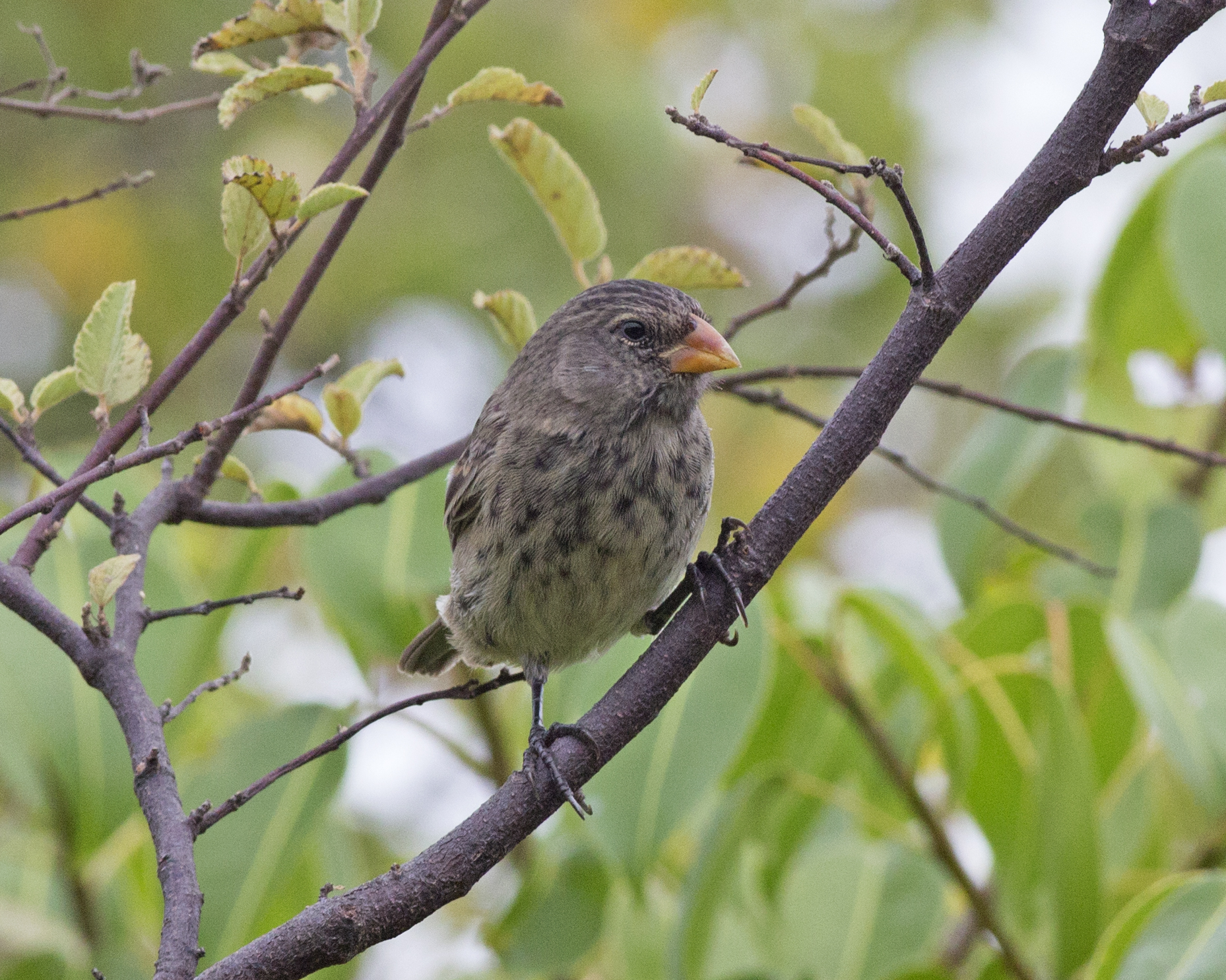 3rd. August 2014 Urbina Bay, Isla Isabella